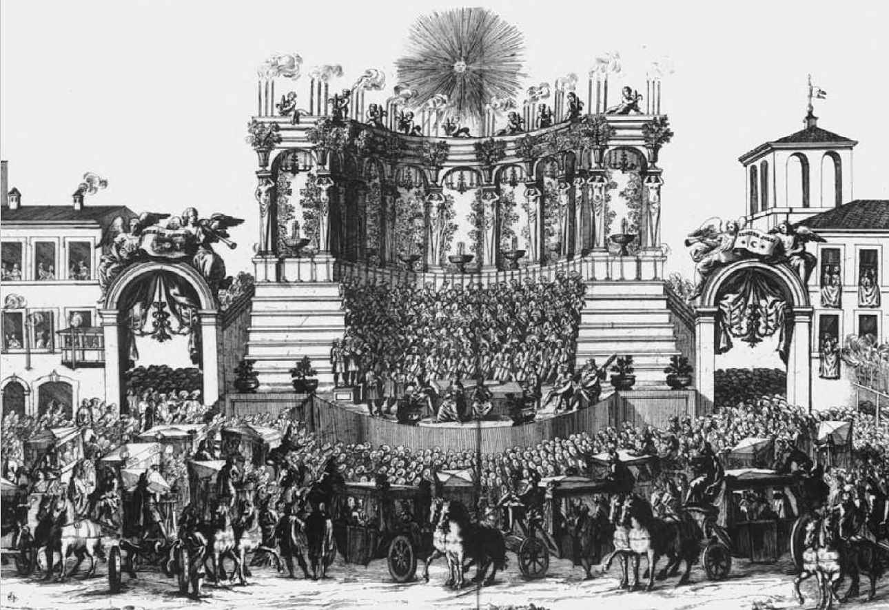 Arcangelo Corelli leading a serenata at Piazza di Spagna.